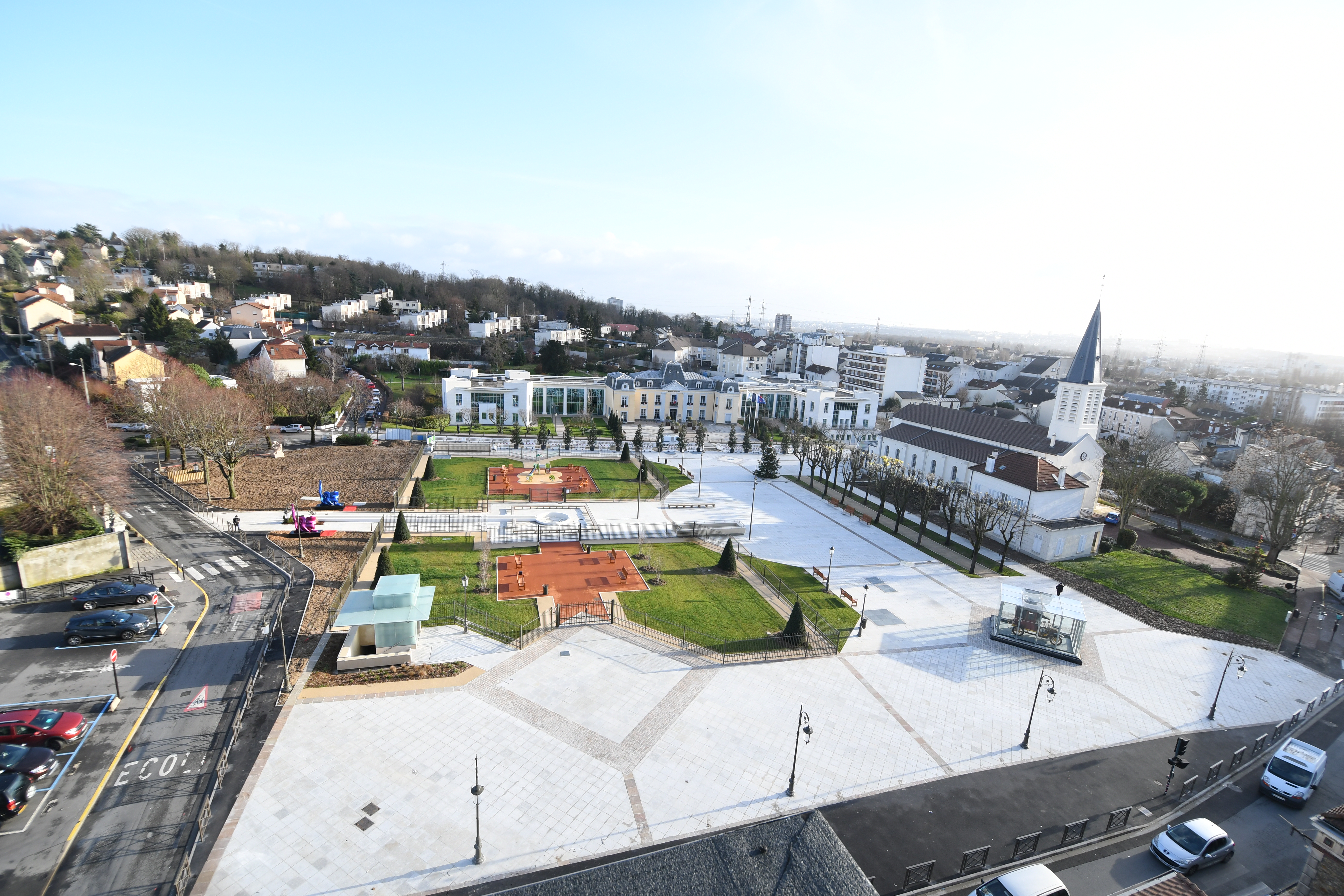 La place Foch, la Mairie, le taxi de la Marne et l'église Saint-Germain.